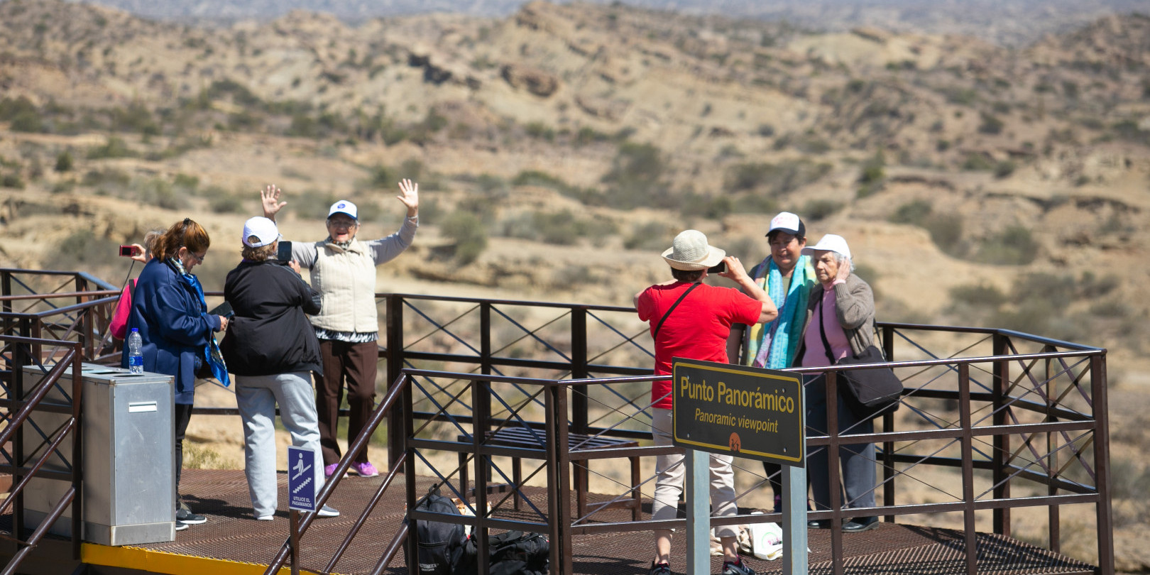 Punto panorámico en Ischigualasto